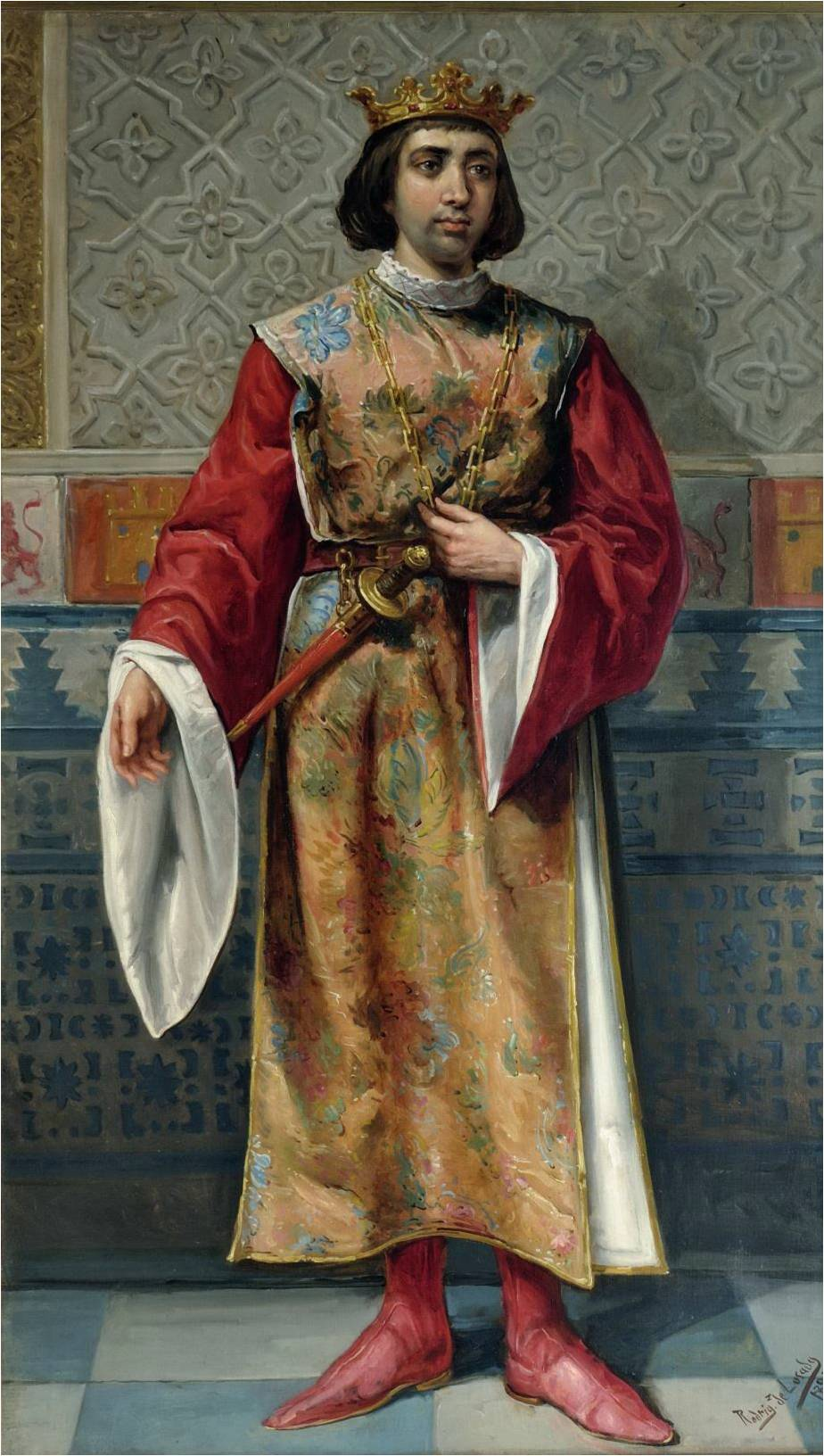 Retrato imaginario del rey Enrique IV de Castilla (1425-1474). Fue hijo del rey Juan II de Castilla y de la reina María de Aragón. Falleció en Madrid en 1474, a los 49 años de edad y fue sucedido en el trono por su hermanastra, la reina Isabel I de Castilla.